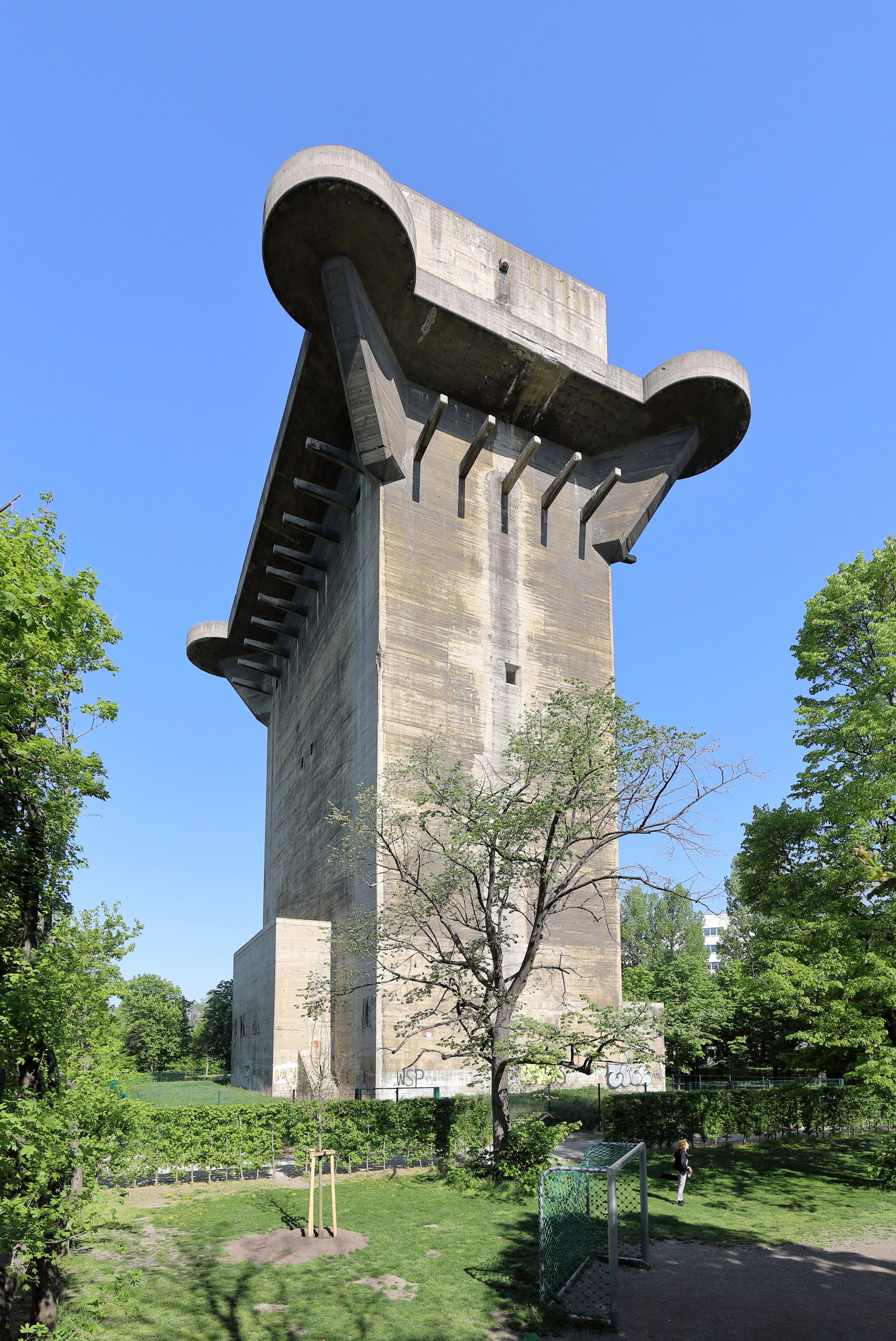 Der Flak-Leitturm im Augarten des 2. Wiener Gemeindebezirkes Leopoldstadt. Der Leitturm und der Geschützturm (rd. 400 m südwestlicher) wurden von 1942 bis 1944 nach Plänen des Architekten Friedrich Tamms errichtet. Weitere Flakturmpaare gibt es in Wien im Arenbergpark und in der Stiftskaserne (Geschützturm) / Esterházypark (Leitturm).